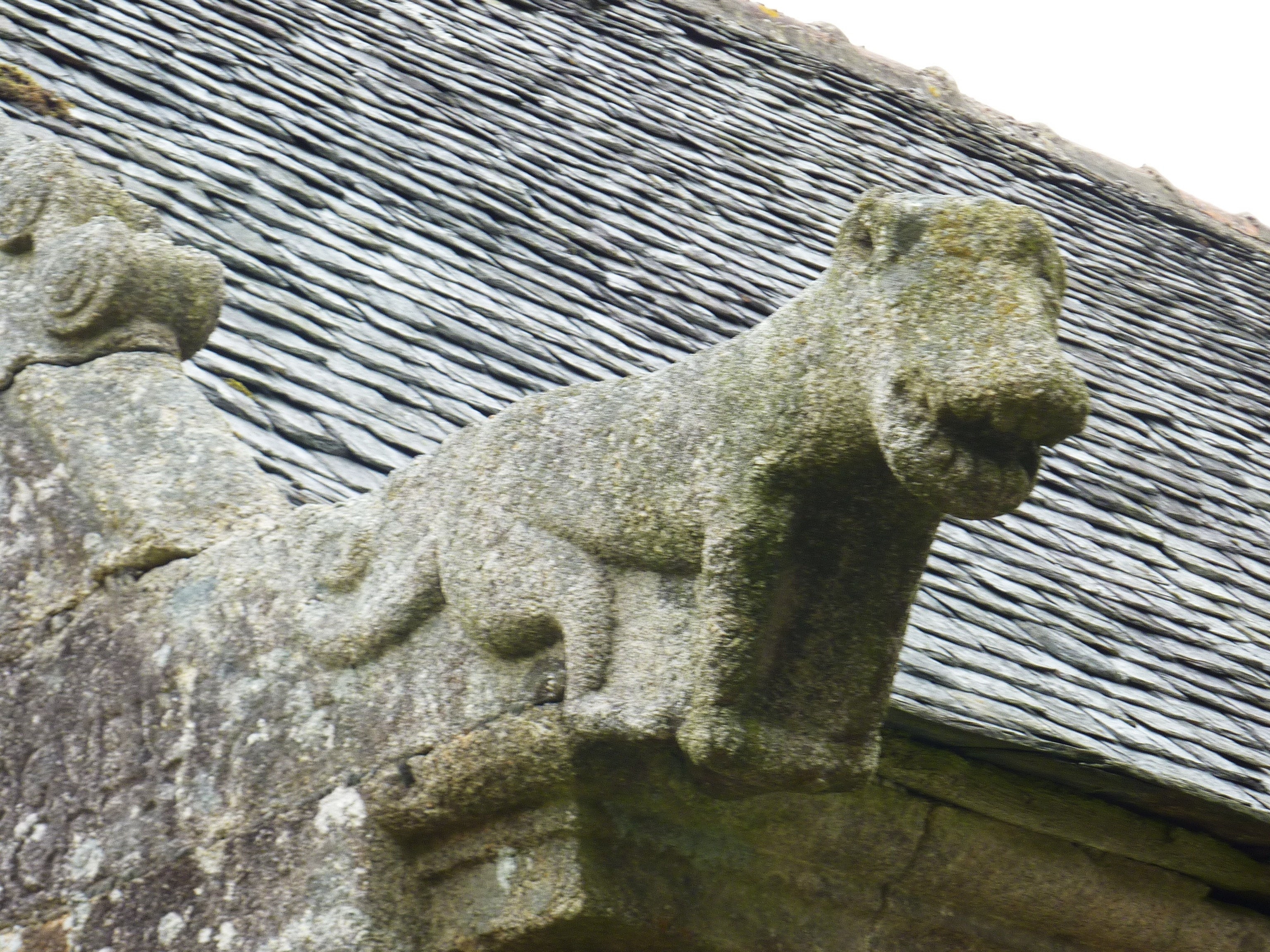 Commana L'ossuaire Gargouille